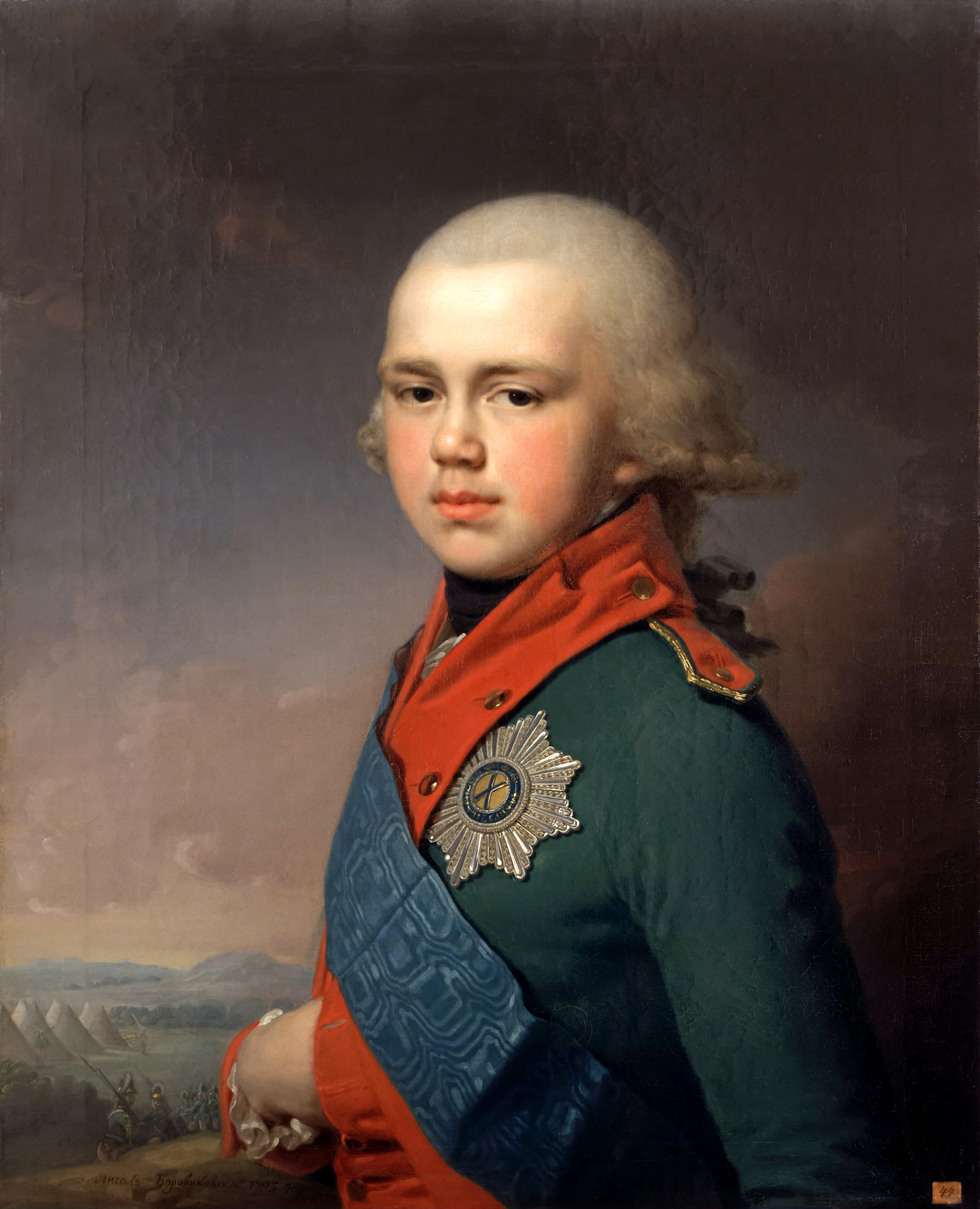 label QS:Lru,"Портрет великого князя Константина Павловича"